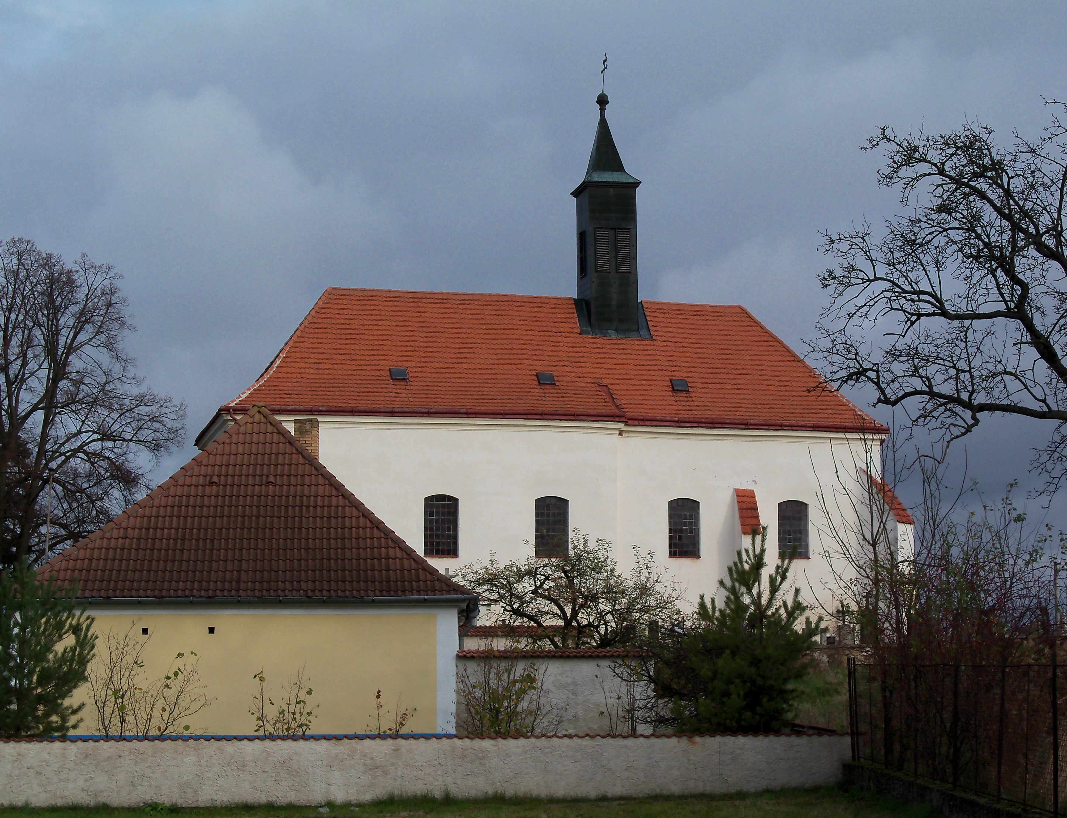 Kostel sv. Mikuláše (Nedvědice), Nedvědice